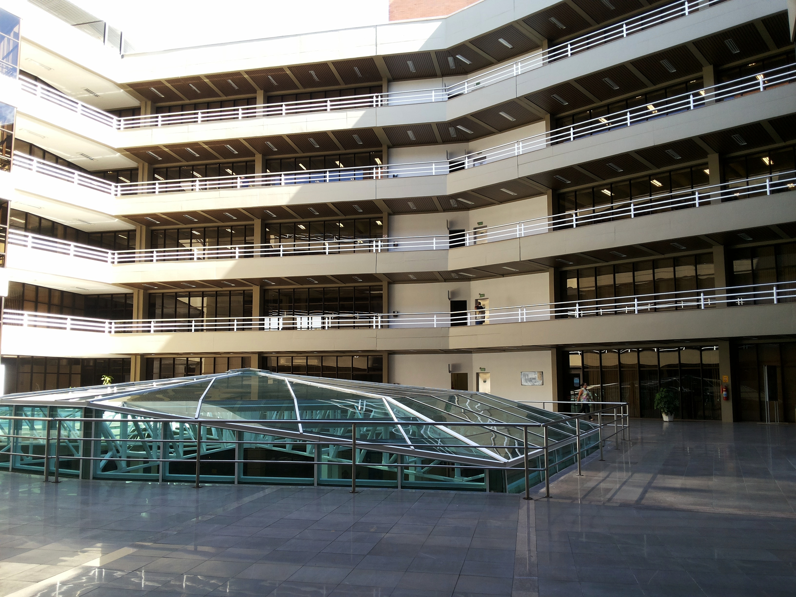 Vista interna do prédio da biblioteca da Unisinos